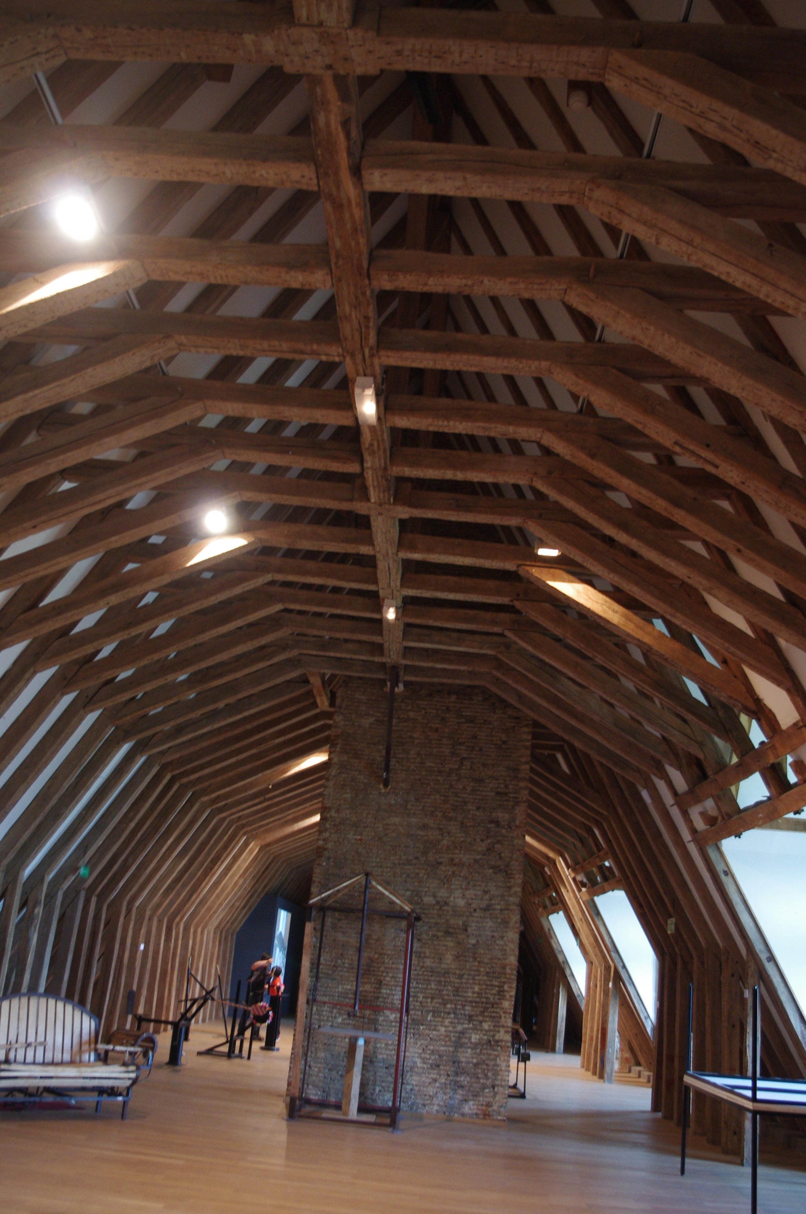 Intérieur du château de Rochechouart. Le grenier.